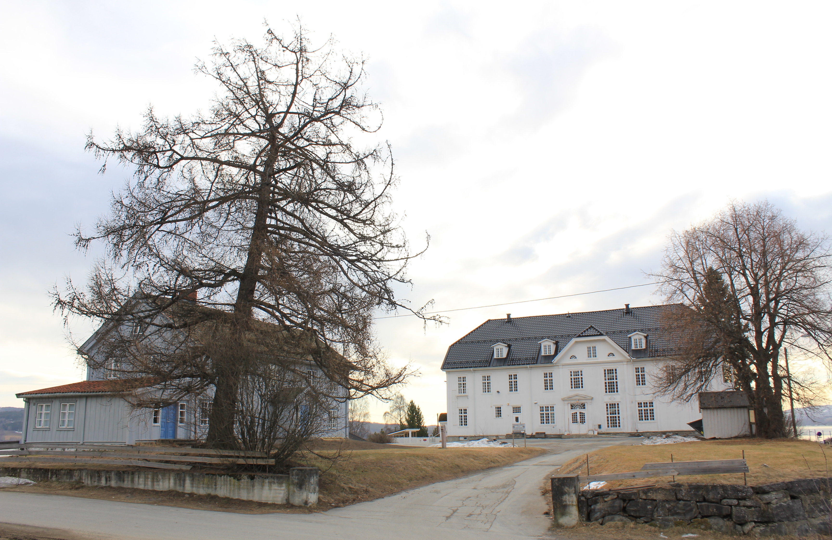 Gjøvik kulturskole holder i dag til i hovedbygningen på tidligere Hunn Gård, som var en av de største gårdene i Oppland. Den historisk viktige tingbygningen ligger til venstre på tunet. Gjennomgangstrafikken har alltid preget livet på Hunn. I eldre tid gikk tverrforbindelsen mellom Sverige og Bergen på Mjøsa ved Hunn. Hovedvegen mellom Christiania og Trondhjem gikk over tunet. Fra hver gård og plass i sognet førte det sti eller tråkk til Hunn. Folk hadde ærend i forbindelse med skyss- og tingferd, post- og kirkegang. Sendebud møttes i gjestgivergården eller på tingstedet der rettssaker ble avgjort i flere hundre år. Se eget bilde av hovedbygningen på Hunn her